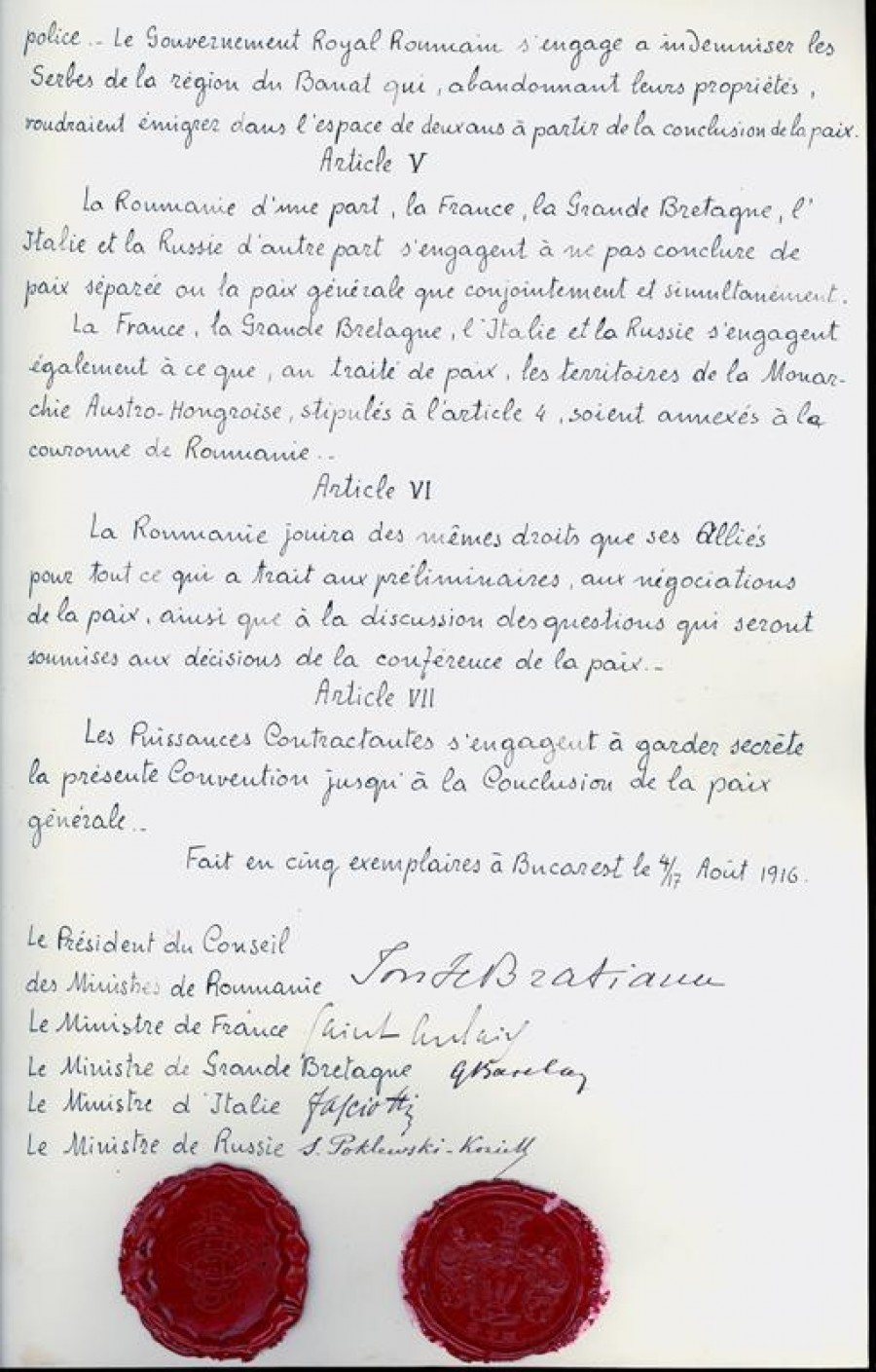 Pagina 3 a Tratatului politic dintre România şi Antanta din 1916 Deţinător - Arhivele Naţionale ale României Restricţii - Fără restricţii fiind un act oficial al statului român